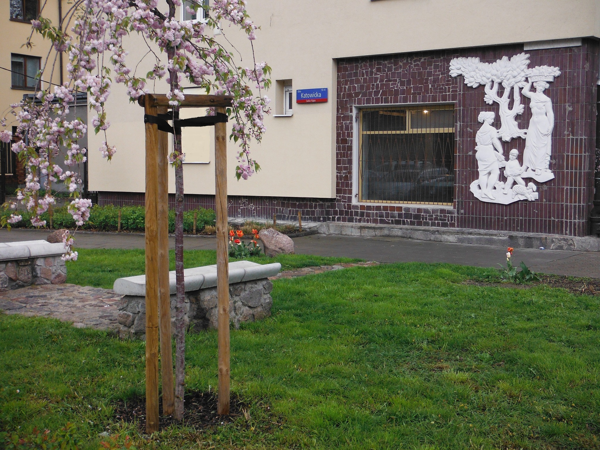 Płaskorzeźba Plon autorstwa Jerzego Jarnuszkiewicza na budynku przy ul. Zwycięzców 11 w Warszawie. Widok od strony ulicy Katowickiej, z odbudowanymi ławami i zrewitalizowanym skwerem.